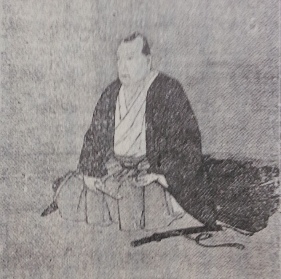 有馬誉純の肖像。